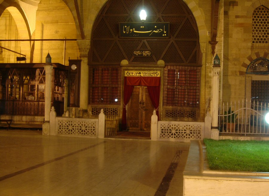 Dzseláleddin Rúmi múzeuma (Konya, Törökország)